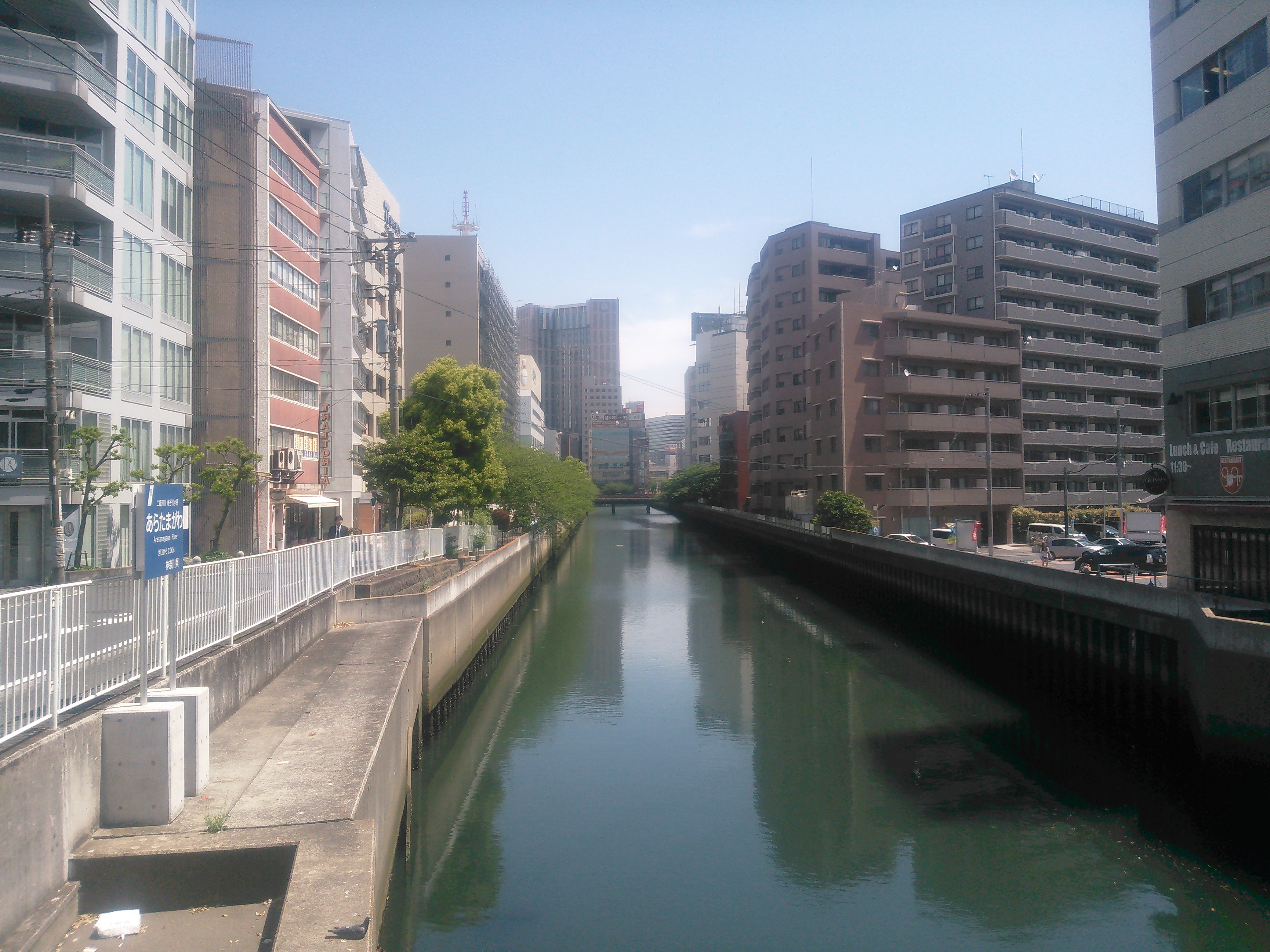 横浜市西区、新田間川